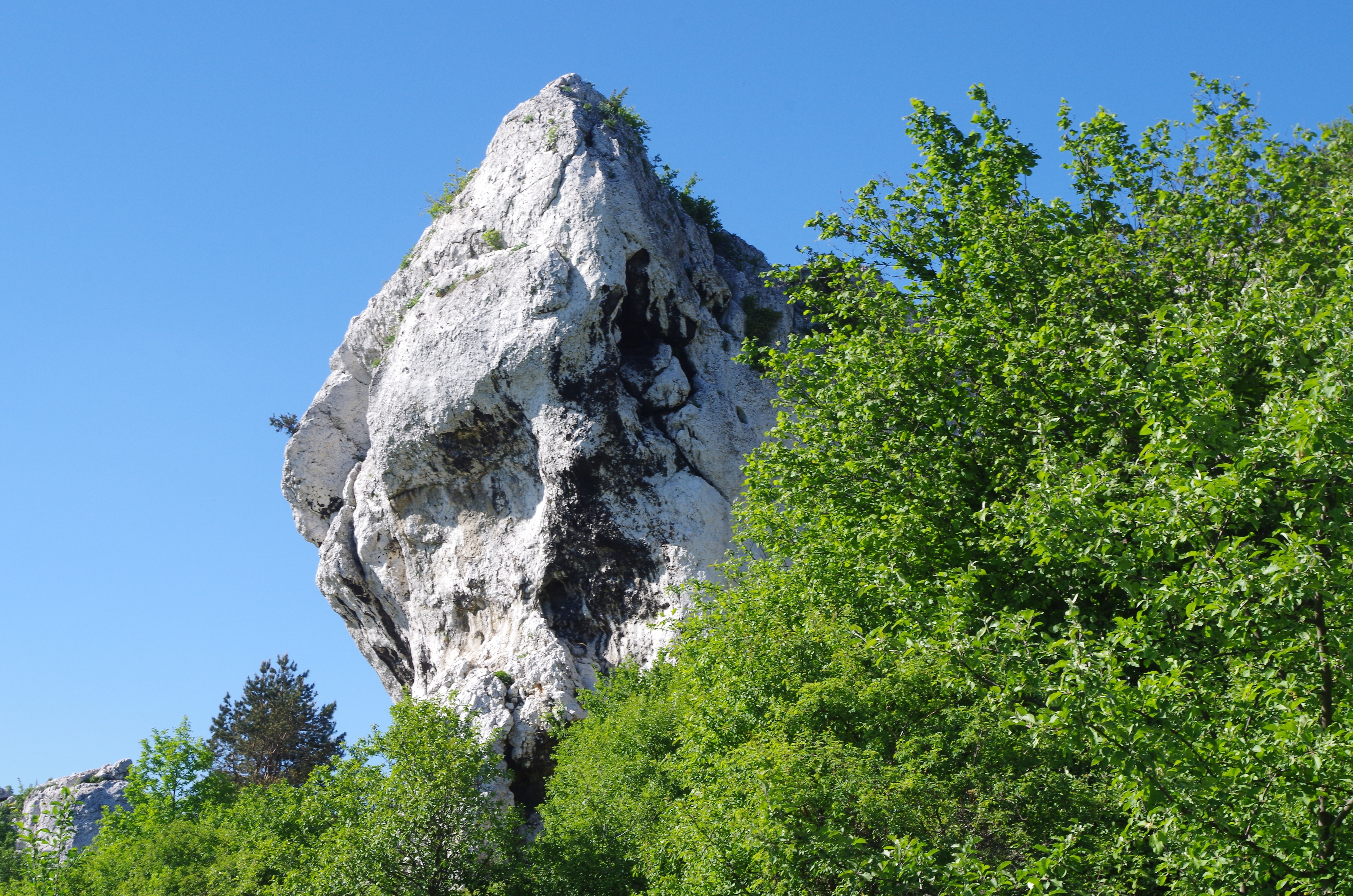 Skały Rzędkowickie. Studnisko